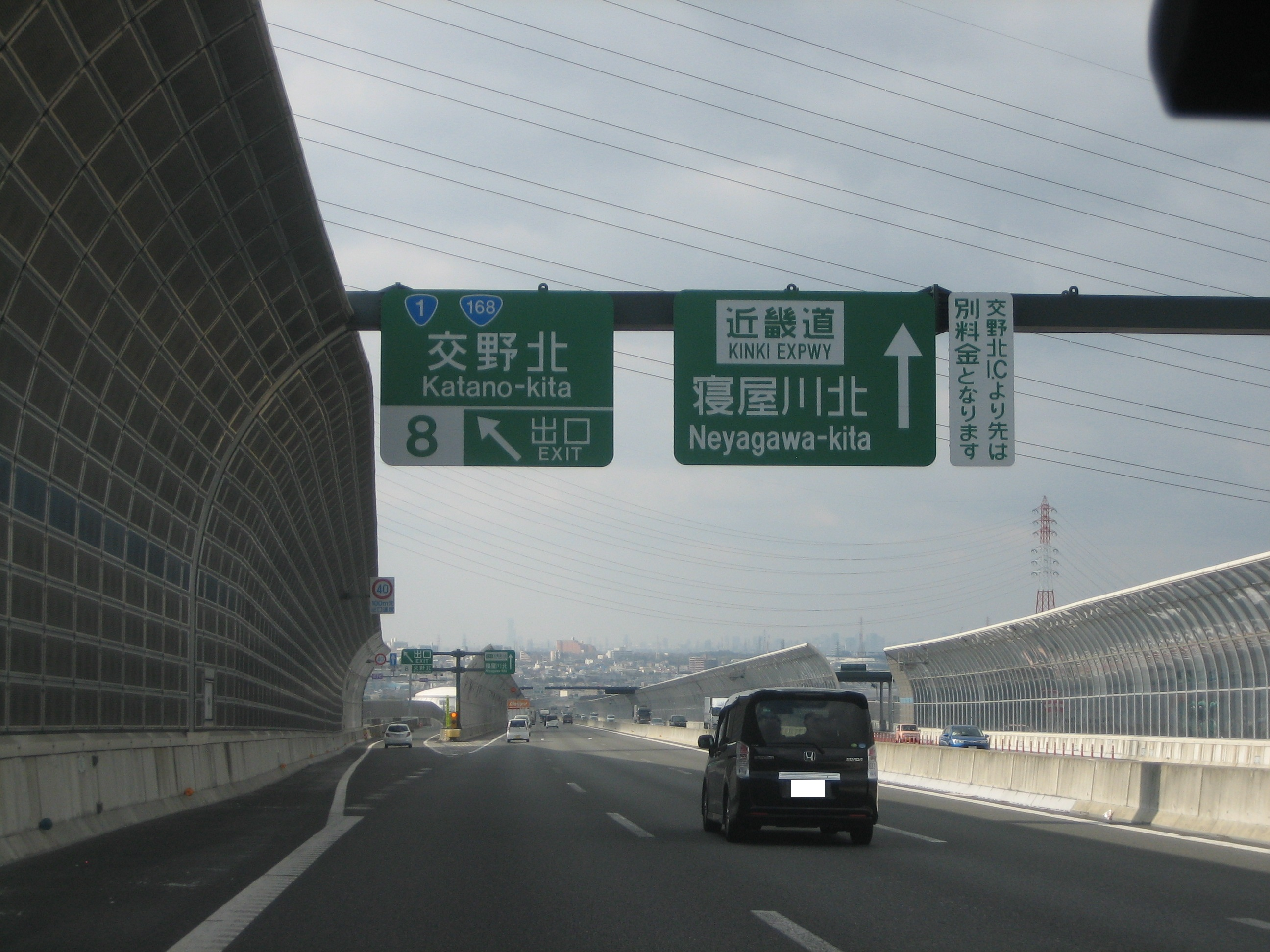 交野北IC